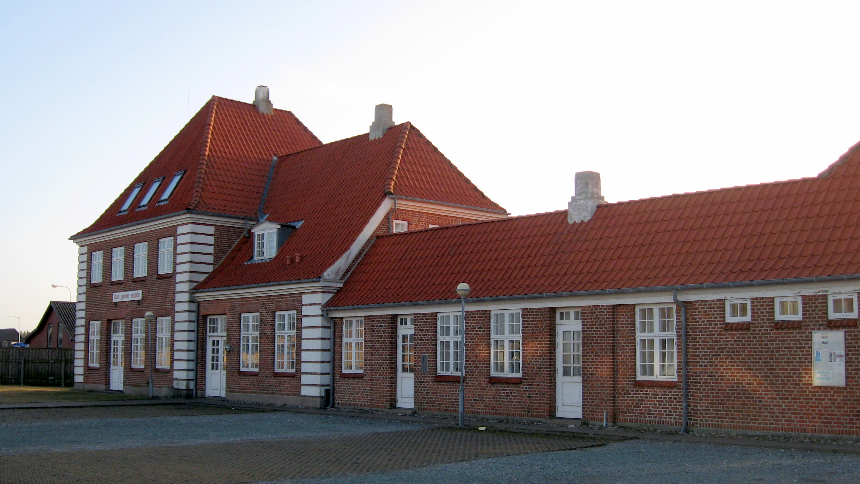 Den Gamle Station i Hirtshals